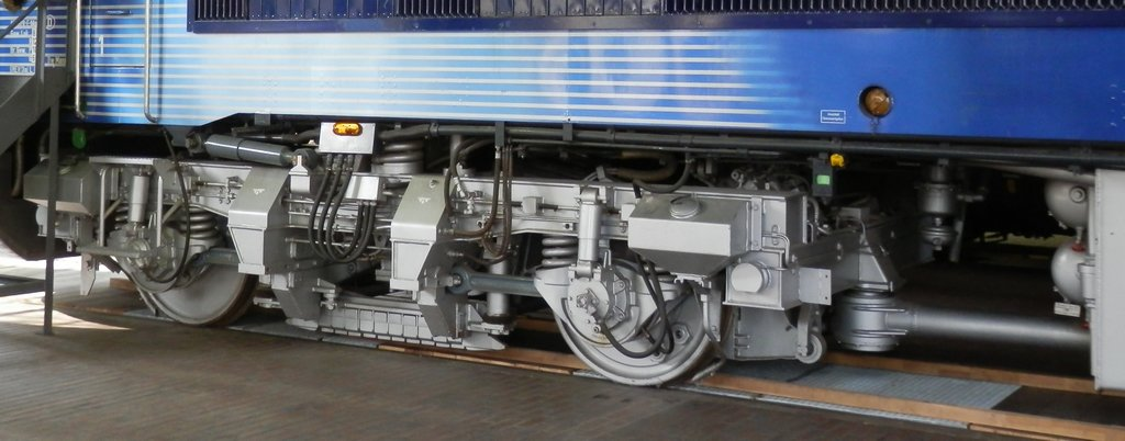 UmAn-Versuchslok 202 003 im Deutschen Technikmuseum Berlin